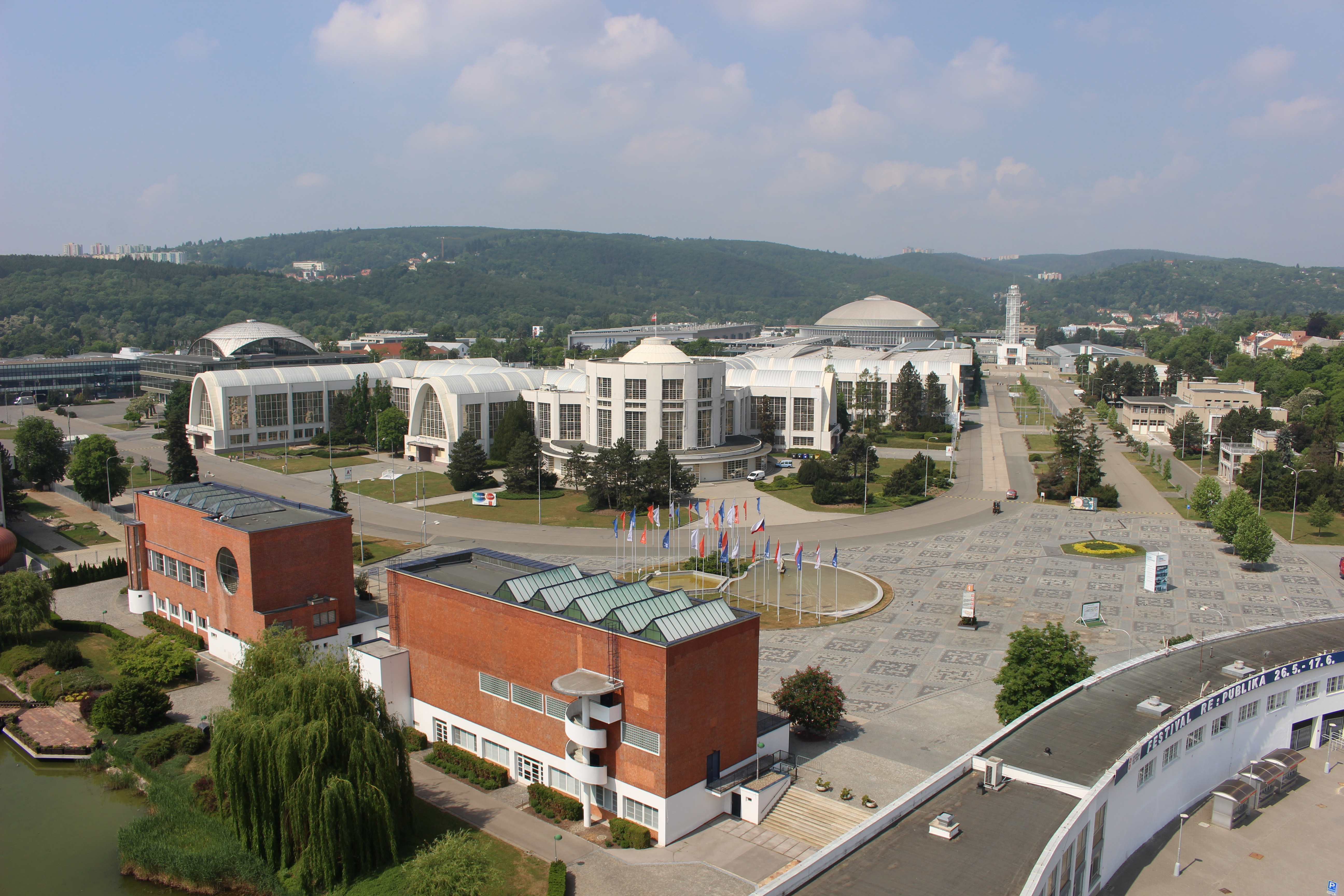 Brněnské výstaviště